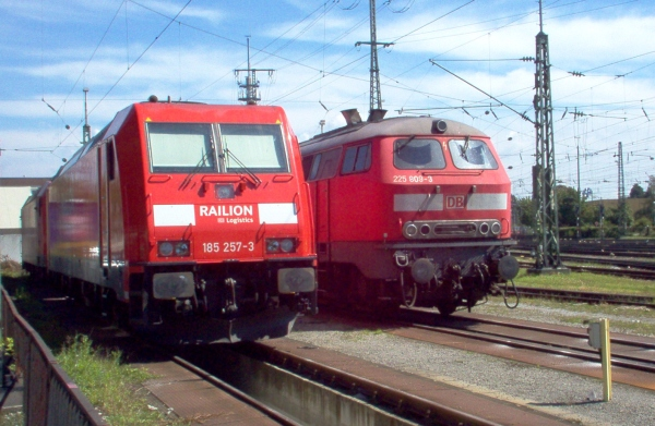 Railion-Lokomotiven im Singener Bahnhof